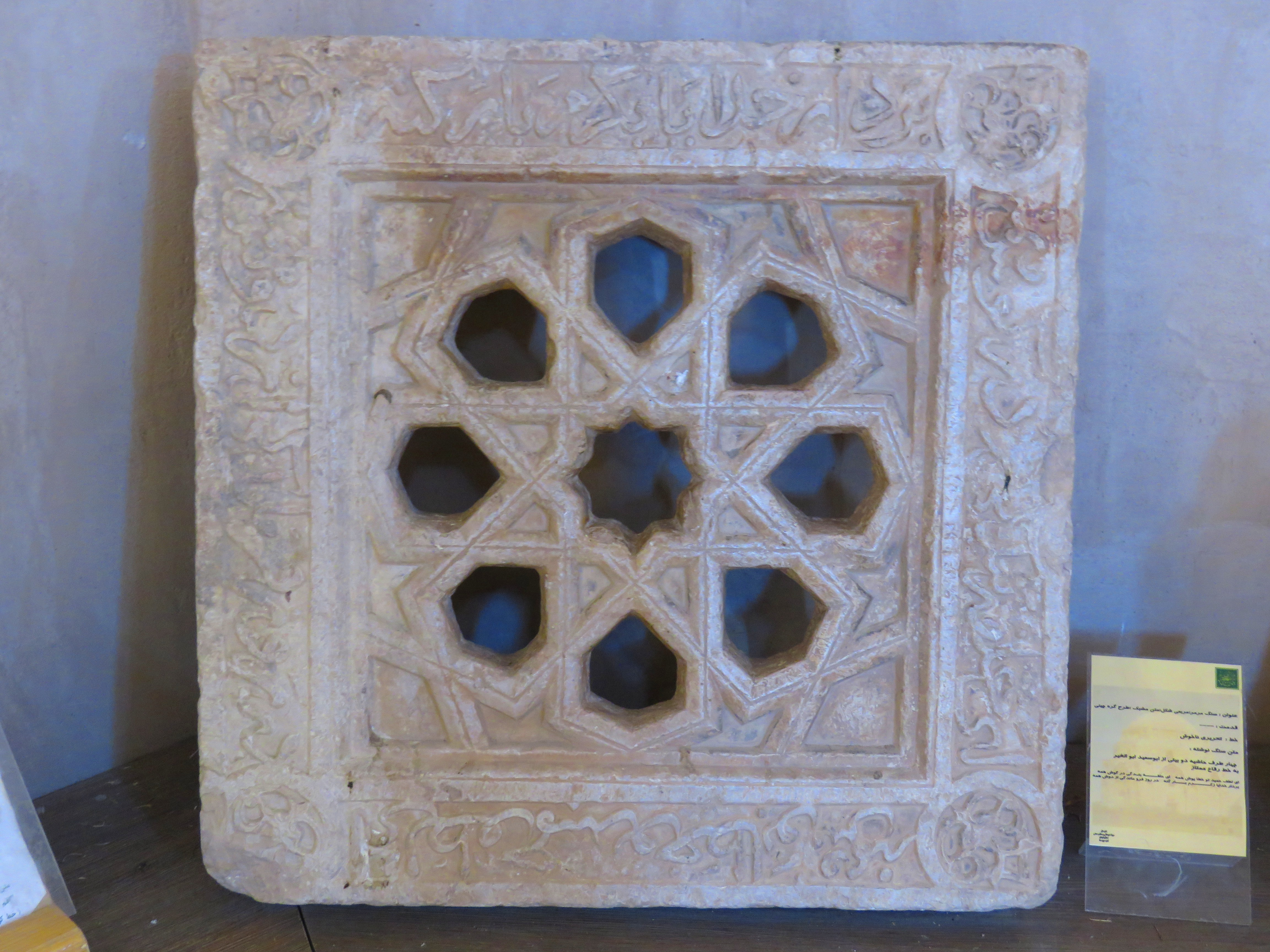 گنبد گبری